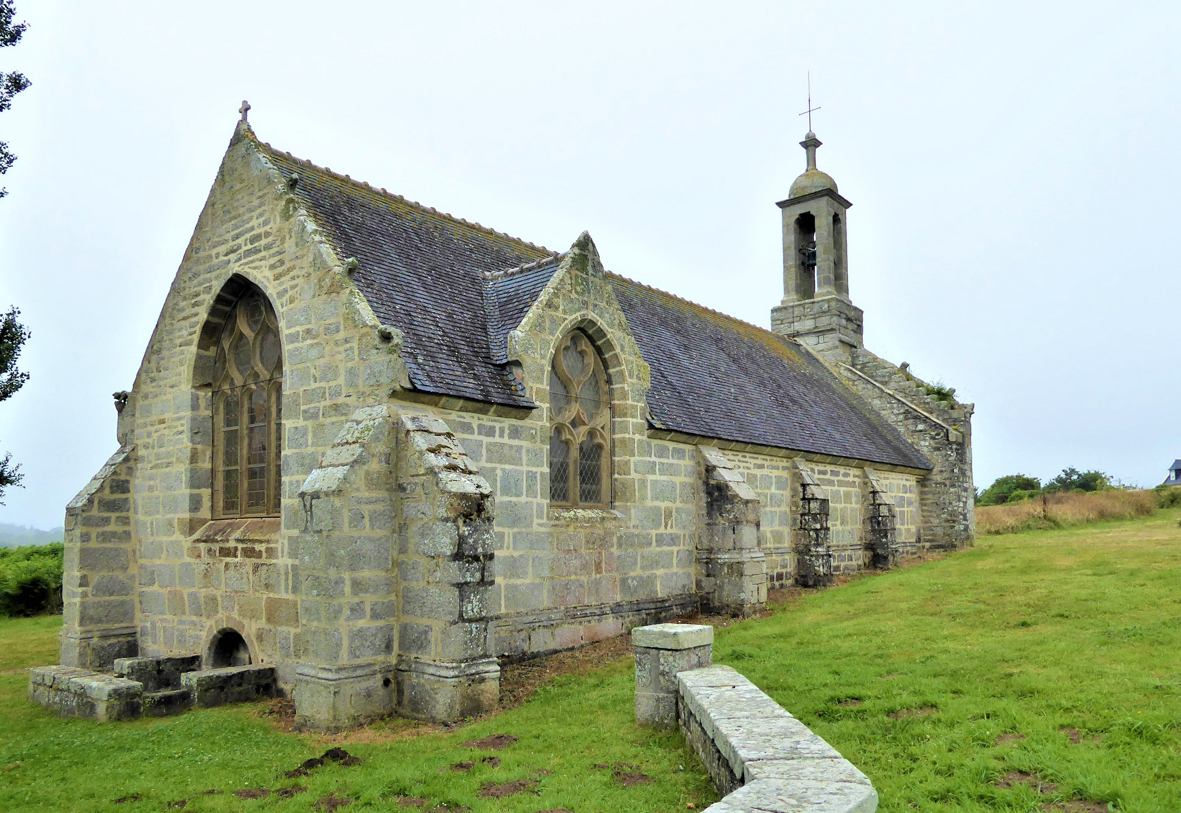 Chapelle Saint-Fiacre de Treffiagat